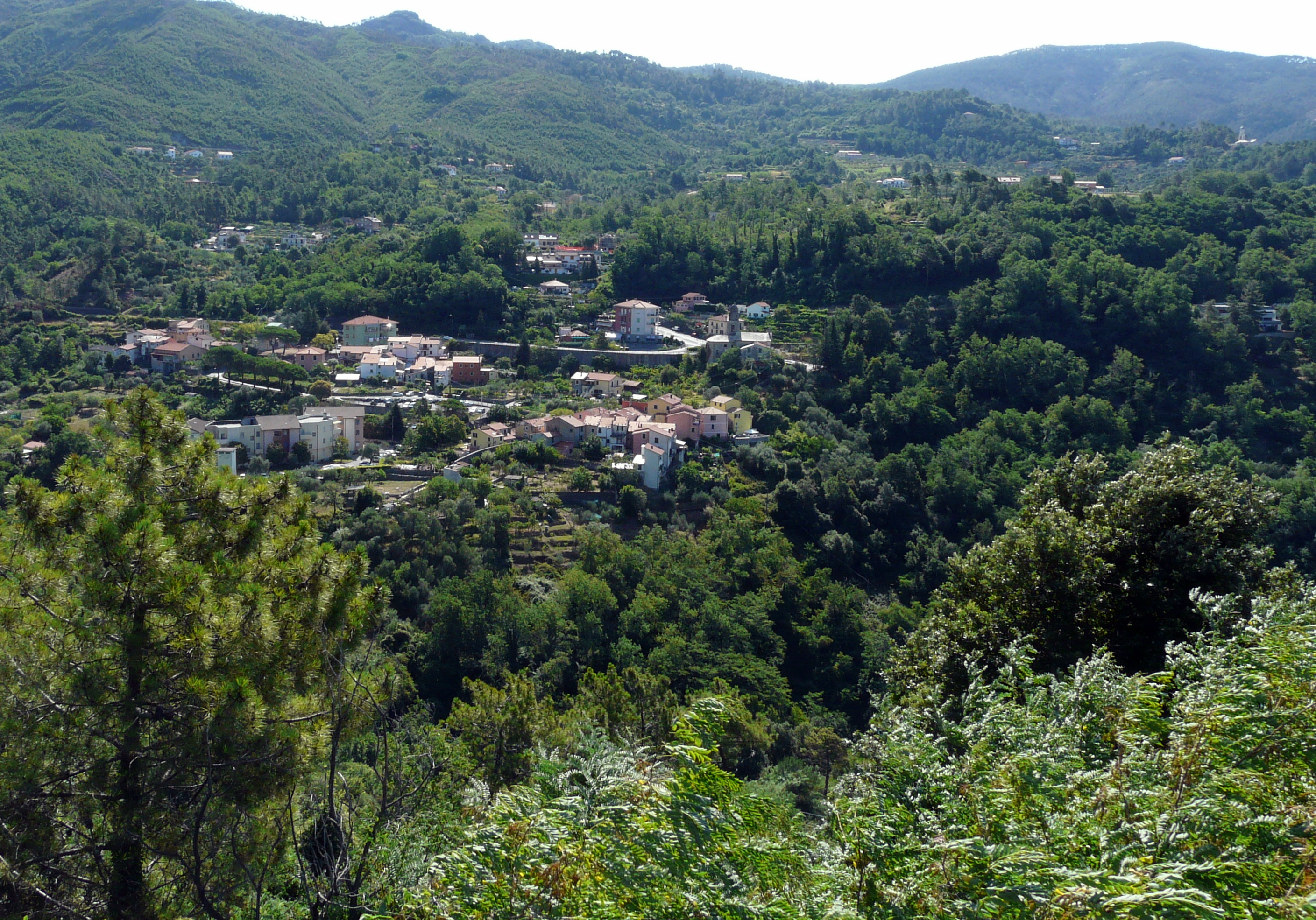 Panorama di Piazza, Deiva Marina, Liguria, Italia